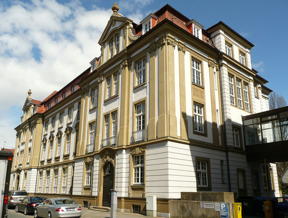 altes Landkreis Gebäude